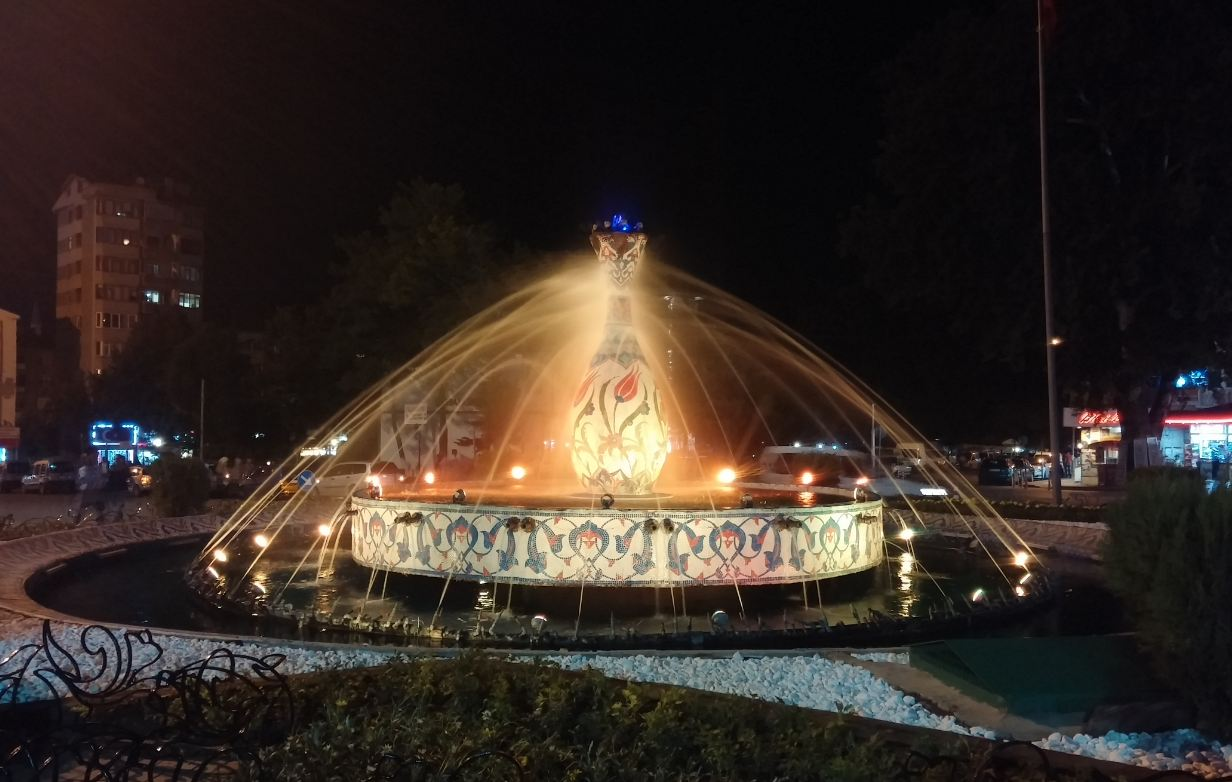 tiles in kütahya turkey